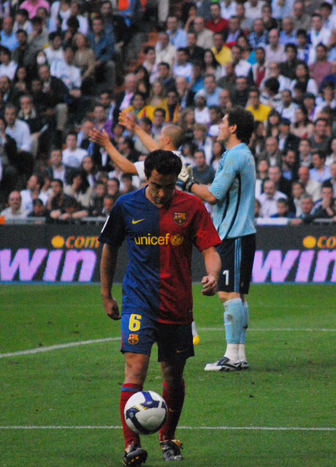 Real Madrid - Barça